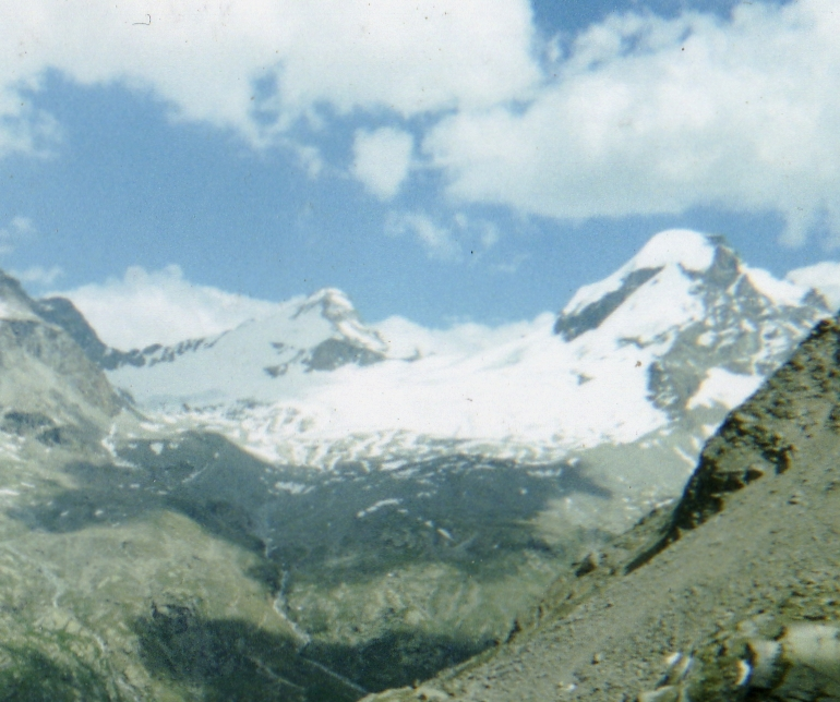 La Tresenta e il Ciarforon (Gran Paradiso National Park)